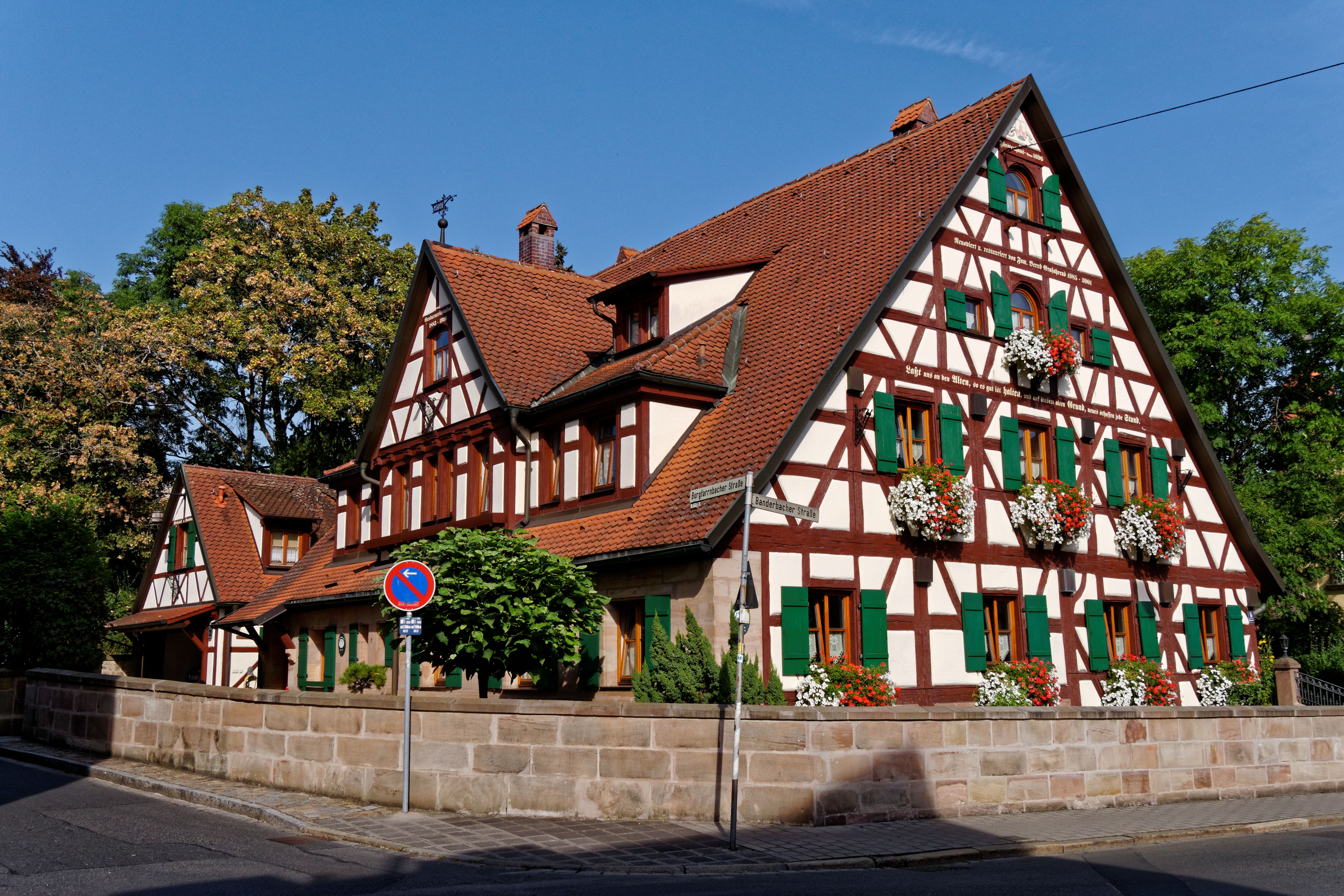 Das 1696 erbaute Fürstenhaus in Zirndorf